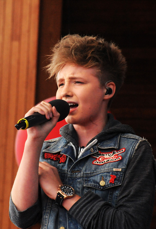 Isac Elliot (2013-08-24 Friends manifestation mot mobbning)